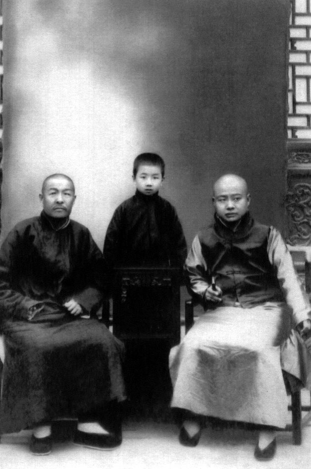 启功（1912年-2005年）中国书法艺术家。此图是他11岁的照片。启功（中）和祖父裕隆（左）以及姑姐丈在一起。